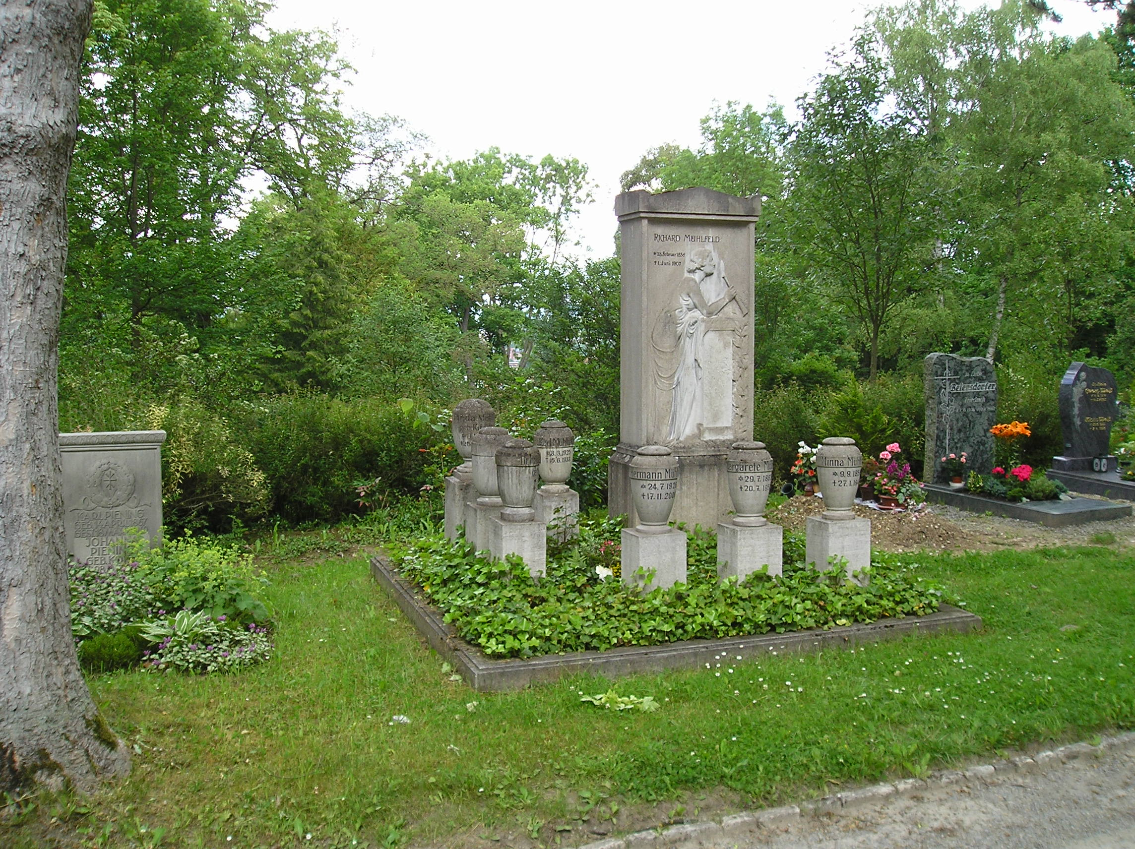 Familiengrabstätte von Richard Mühlfeld auf dem Parkfriedhof in Meiningen